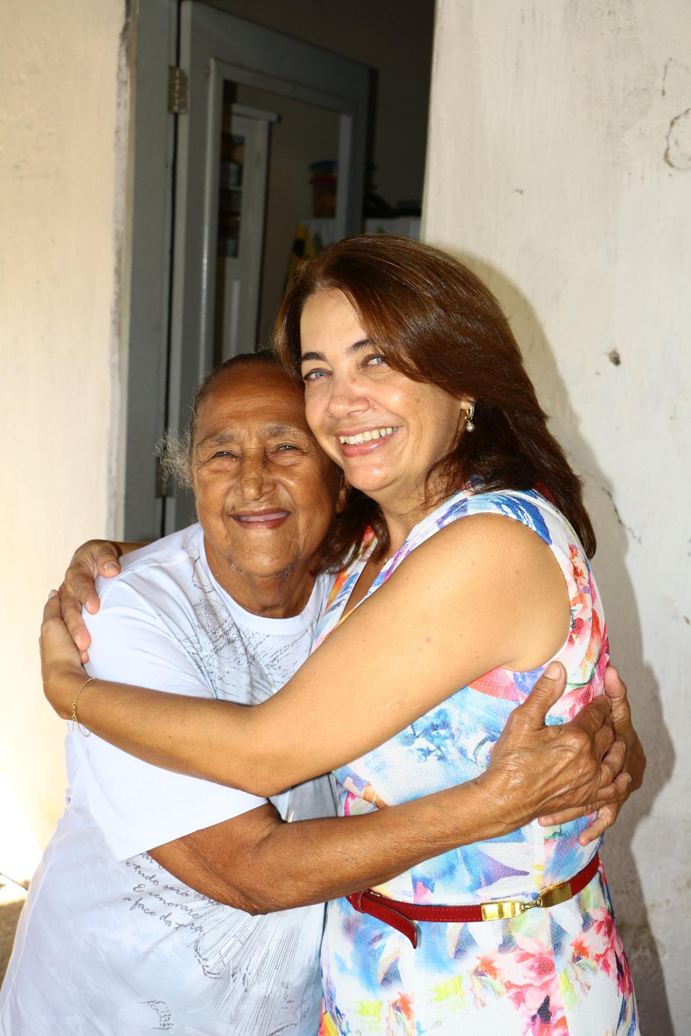 Mary Gouveia